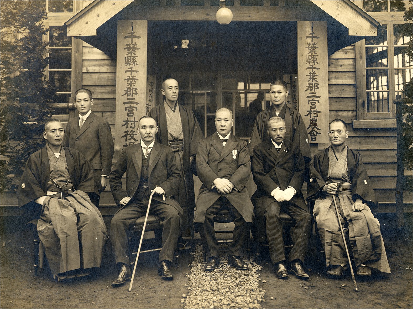 千葉郡千葉郡にあった二宮村の村役場の写真（現在は船橋市役所二宮出張所が所在している）